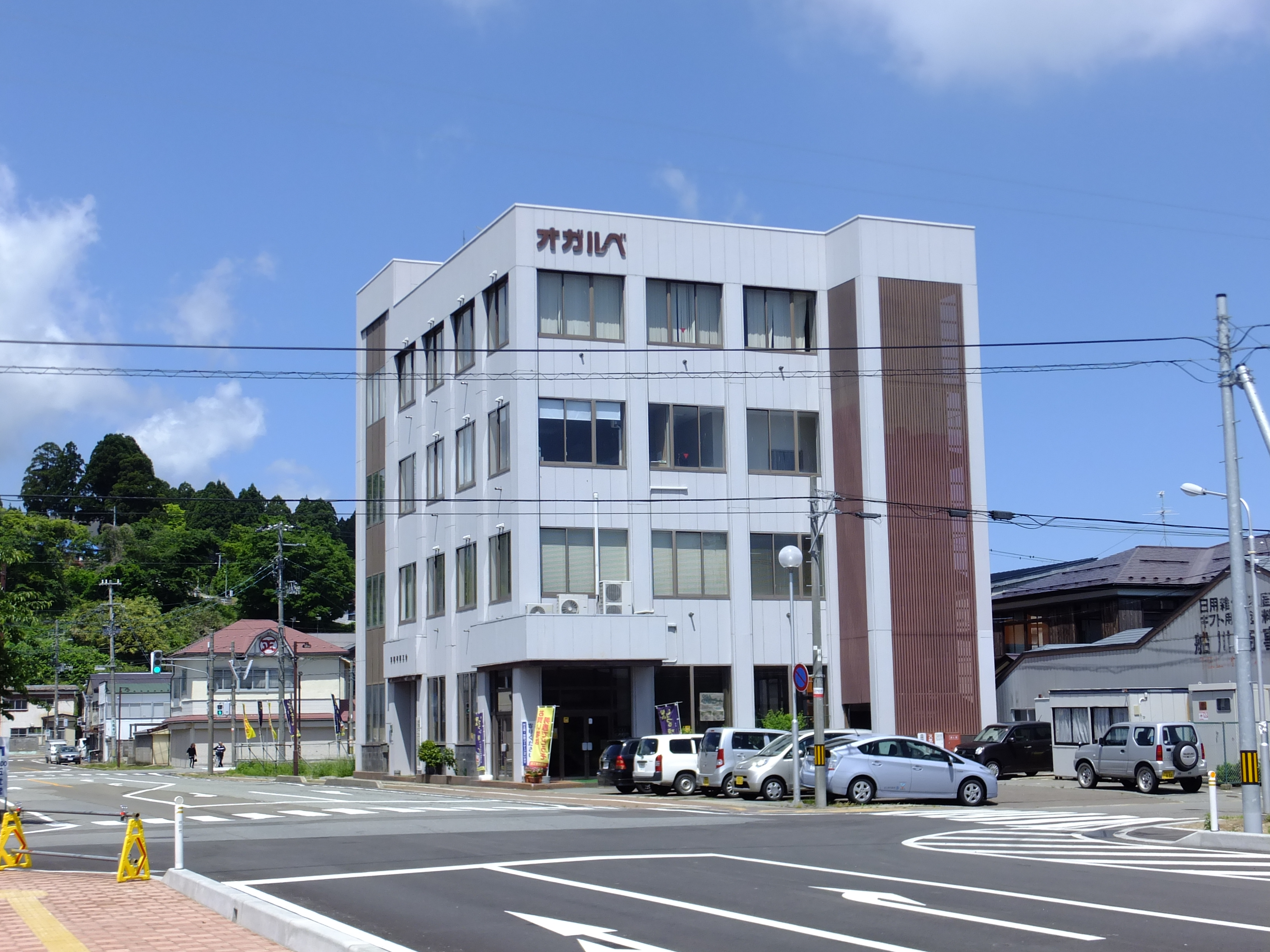 男鹿市商工会館オガルベ（旧秋田県中央信用組合本所）